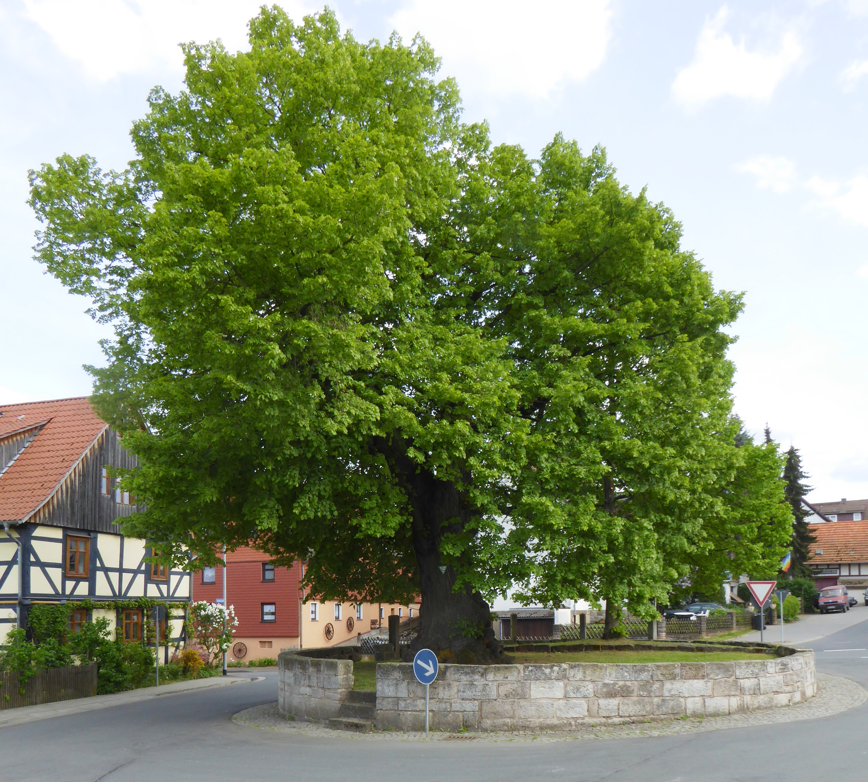 Gerichtsplatz in Dohrenbach, Stadt Witzenhausen, Nordhessen, mit zwei Linden. Die ältere Linde ist als Naturdenkmal ausgewiesen (Schild am Baumstamm) und stand bis zur Straßenerweiterung außerhalb des ummauerten Platzes, während eine andere Linde für die Verlegung des Platzes gefällt werden musste. (Quelle: „Gerichtsplatz in Dohrenbach“, in: Gerichtsstätten in Hessen (Stand: 5.5.2013))